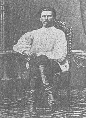 Aleksandr Konstantinovic Solov'ev (1846-1879)